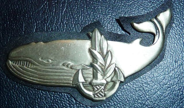 אות הלויתן המחייך